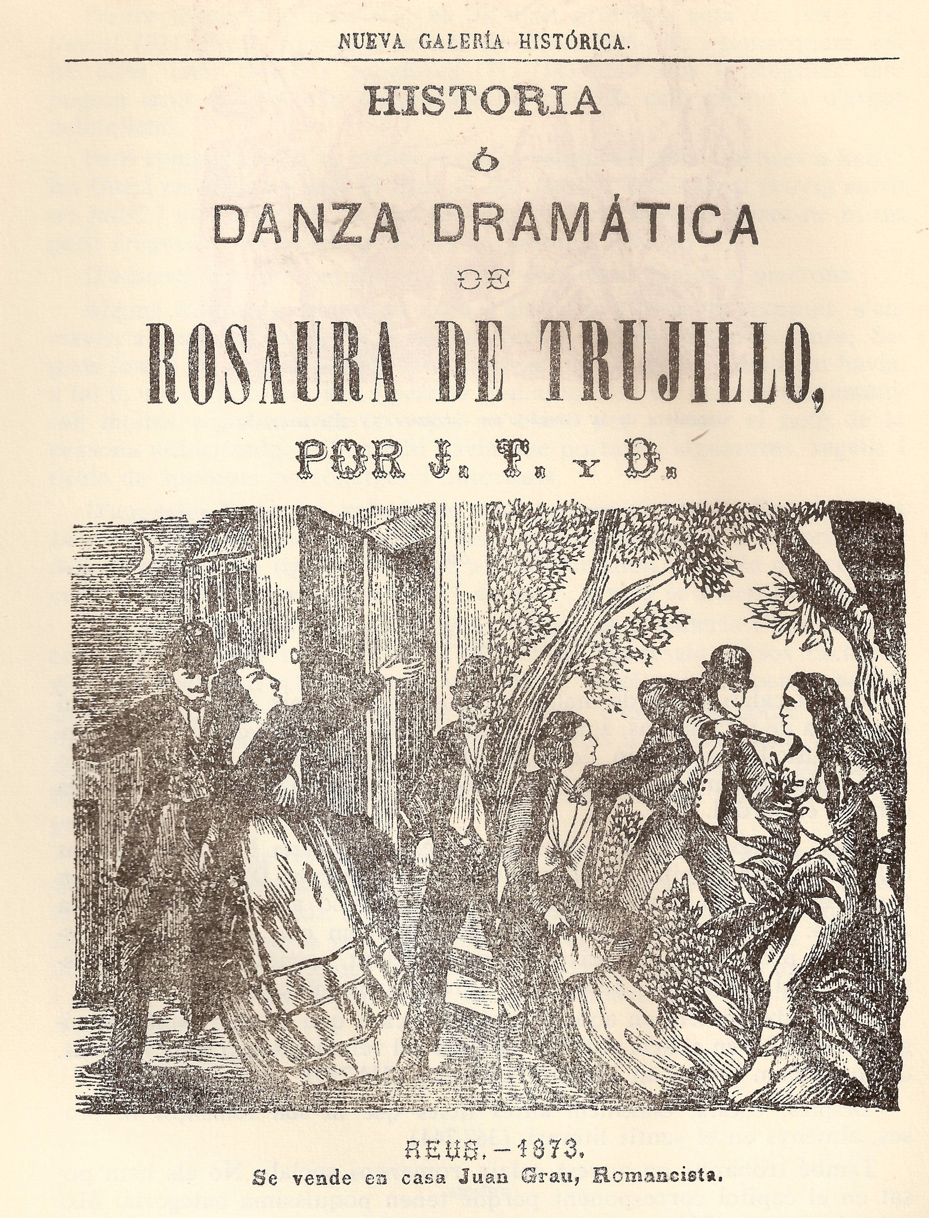 Portada de la Història de Rosaura de Trujillo escrita per Francesc Torné i Domingo